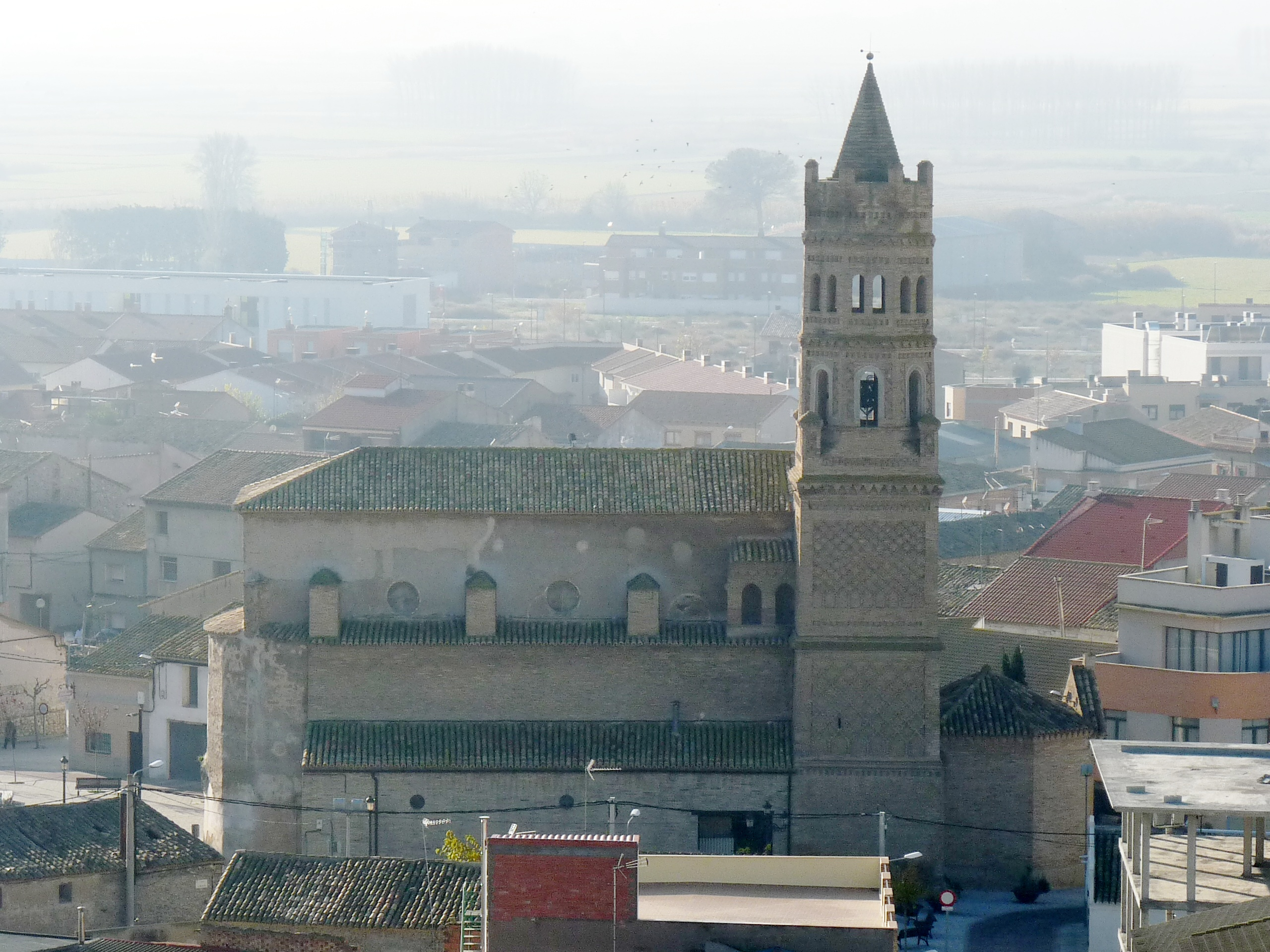 Alfajarín - Iglesia de San Miguel Arcángel (siglo XII - XVIII)